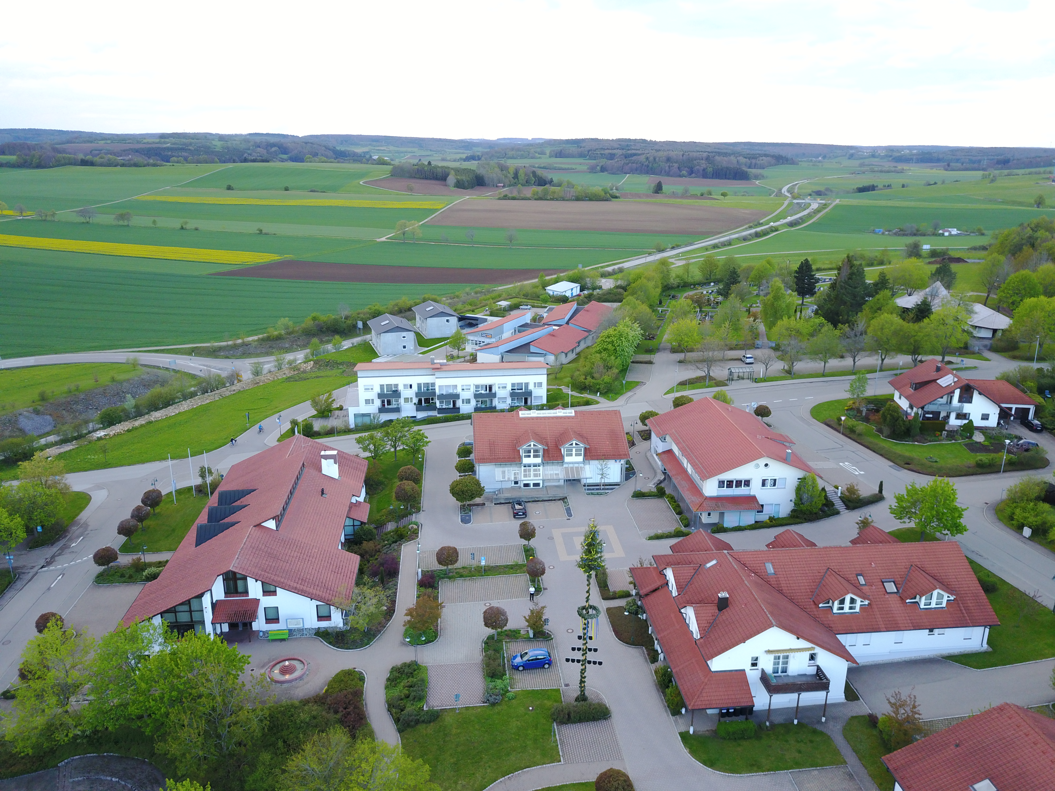 Luftaufnahme von Heroldstatt Ortsmitte mit Maibaum 2017 Blick in Richtung Norden